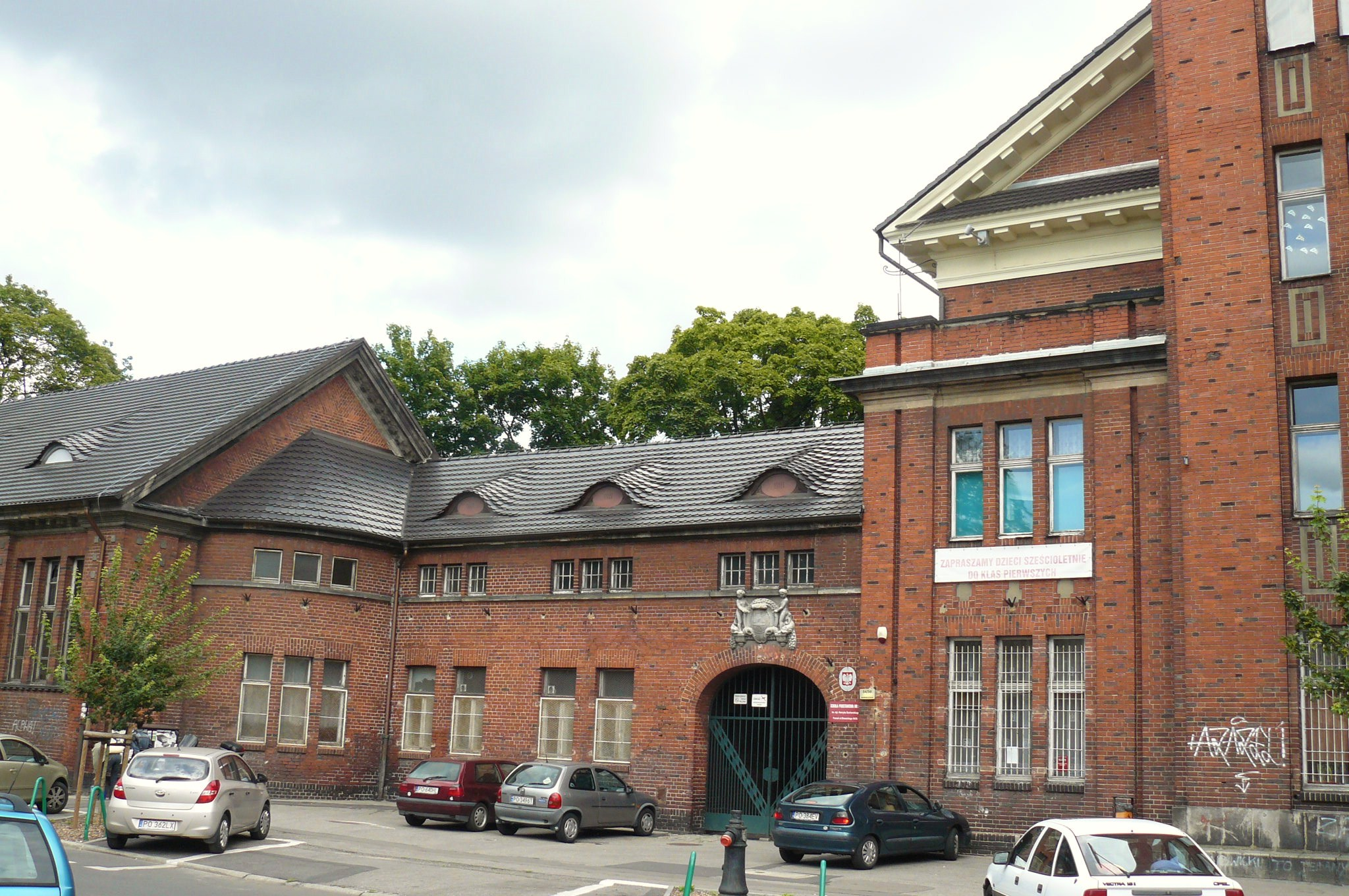 Poznań Jeżyce, ul. Słowackiego 54/60 - Szkoła Podstawowa nr 36 im. Henryka Sucharskiego, zespół zabudowań szkolnych